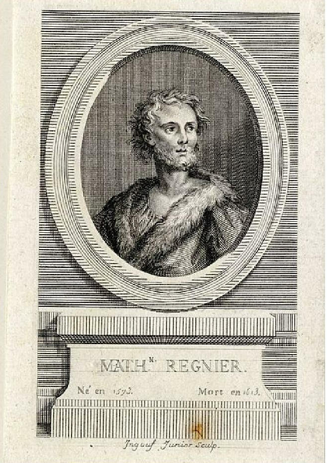 Mathurin Régnier, écrivain français